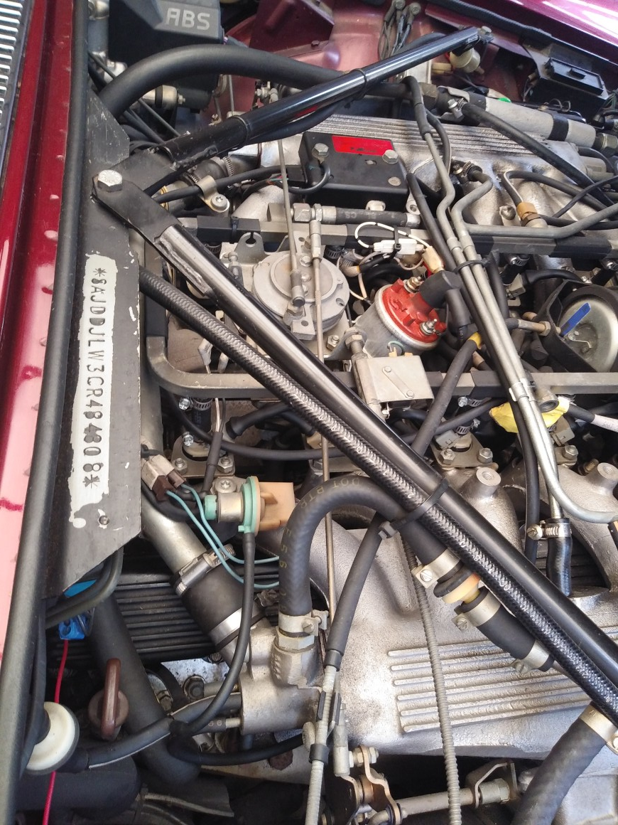 エンジン（2019年自宅ガレージにて撮影）